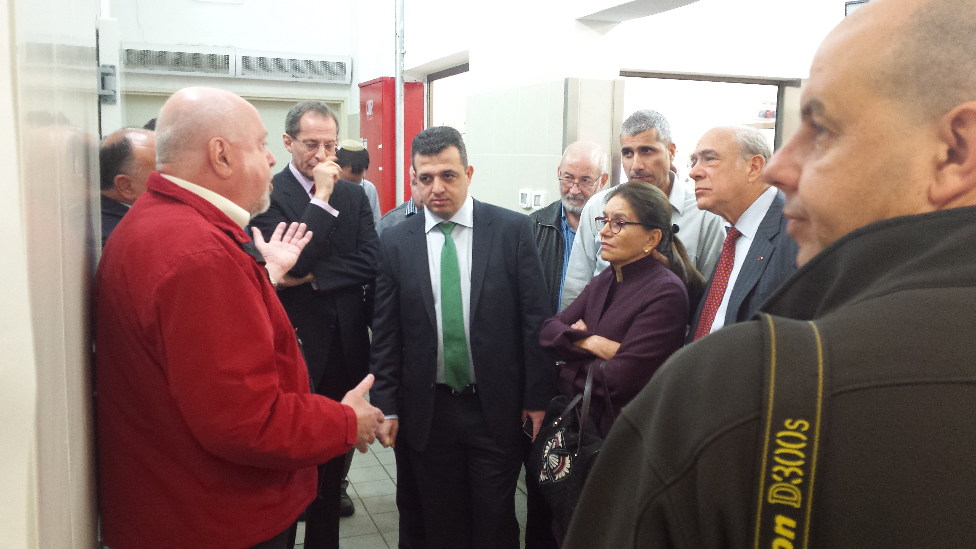 ביקור מזכ"ל ה-OECD בקייטרינג חורה והצגת המודל של העסקי החברתי לנציגי האוצר והמזכ"ל